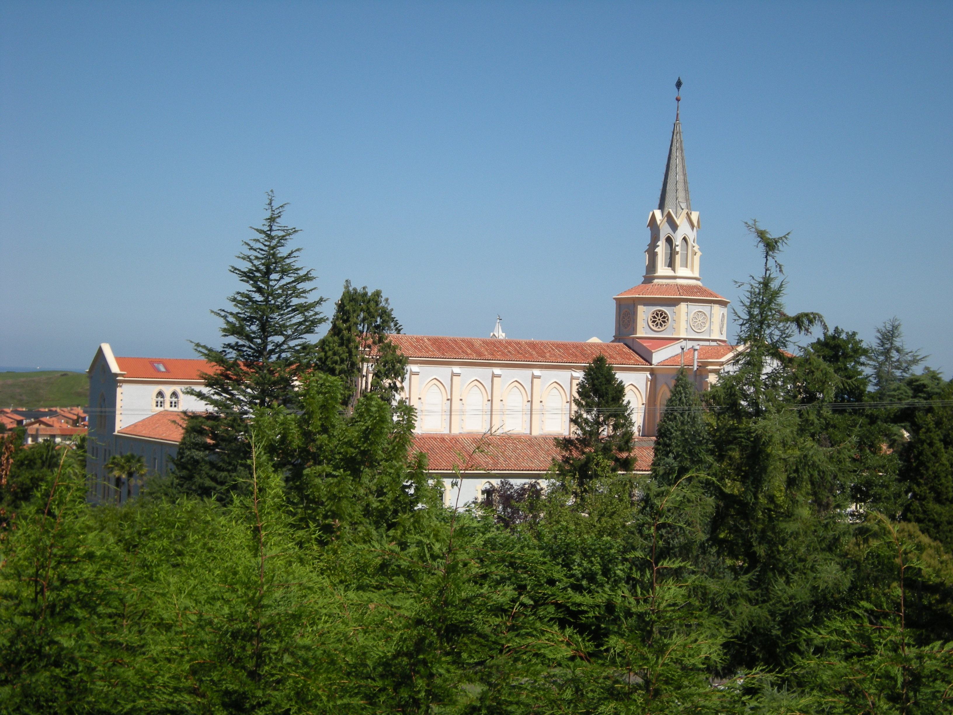 Abadía Cisterciense de Santa María de Viaceli en Cóbreces.